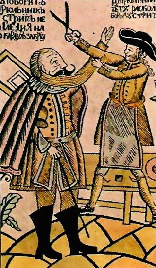 Una moneda por barba